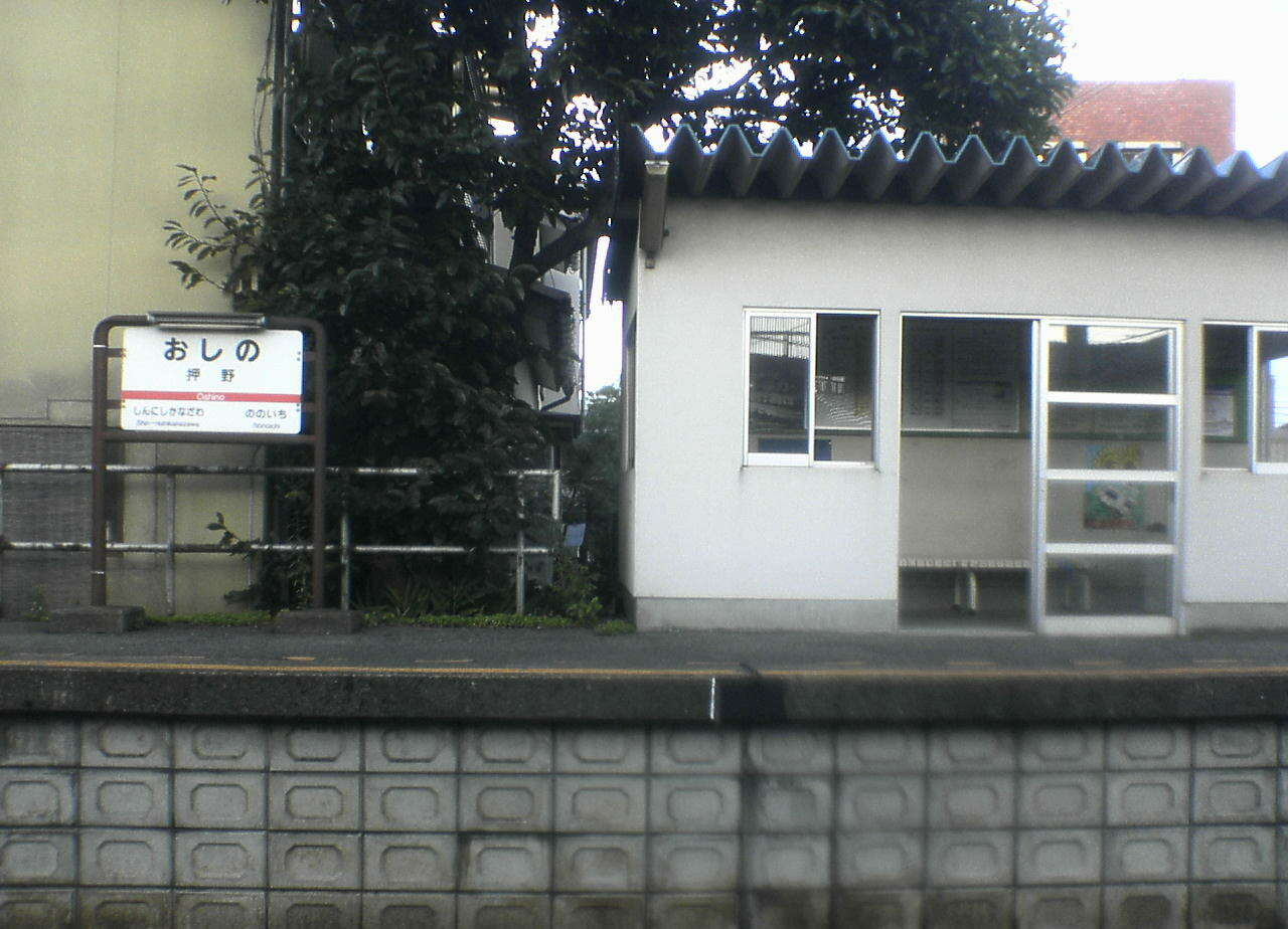 北陸鉄道石川線・押野駅を2005年8月20日投稿者自身が撮影。